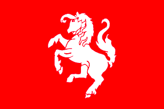 Vlag van Twente